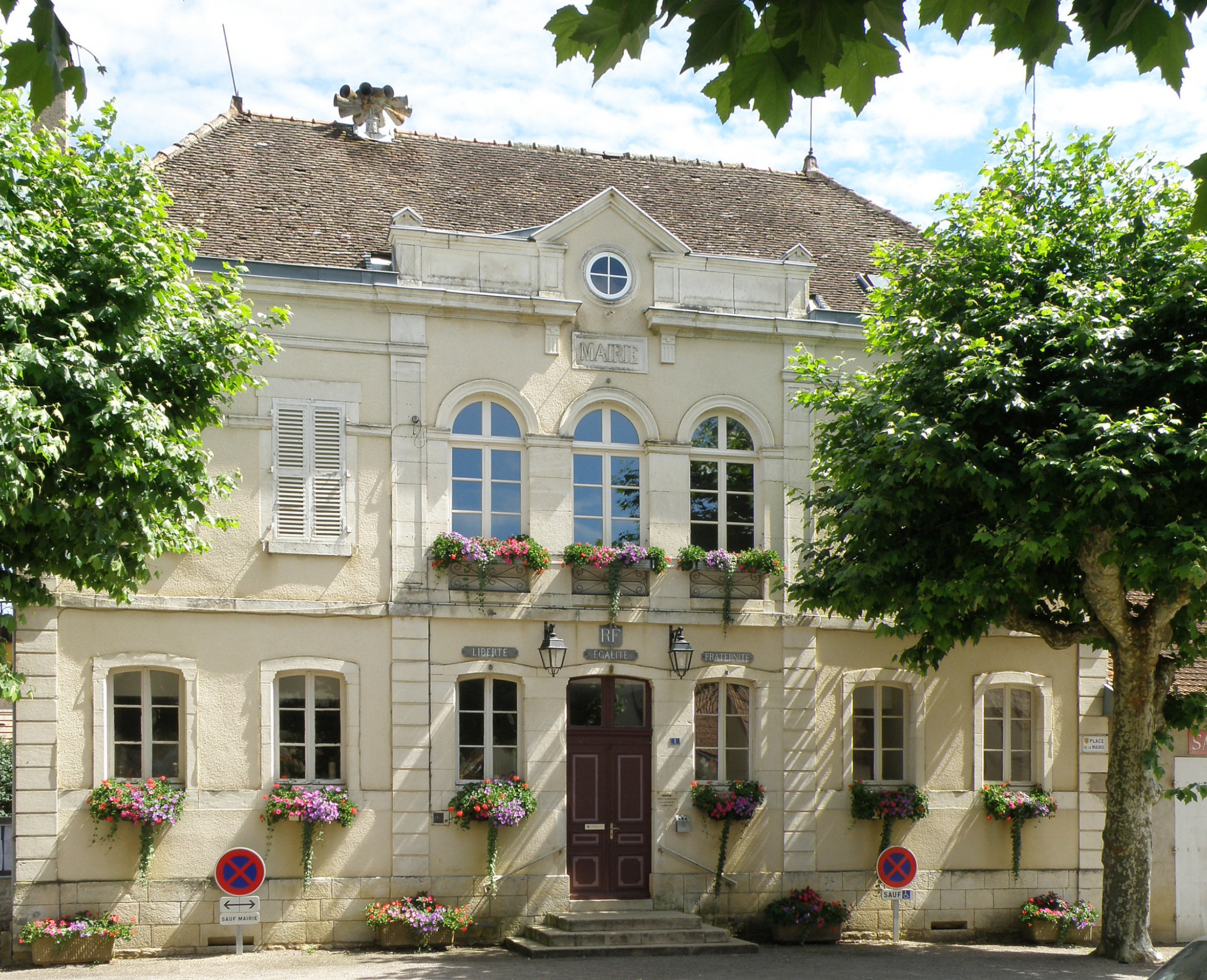 Santenay (Côte-d’Or, Bourgogne, France). Mairie.